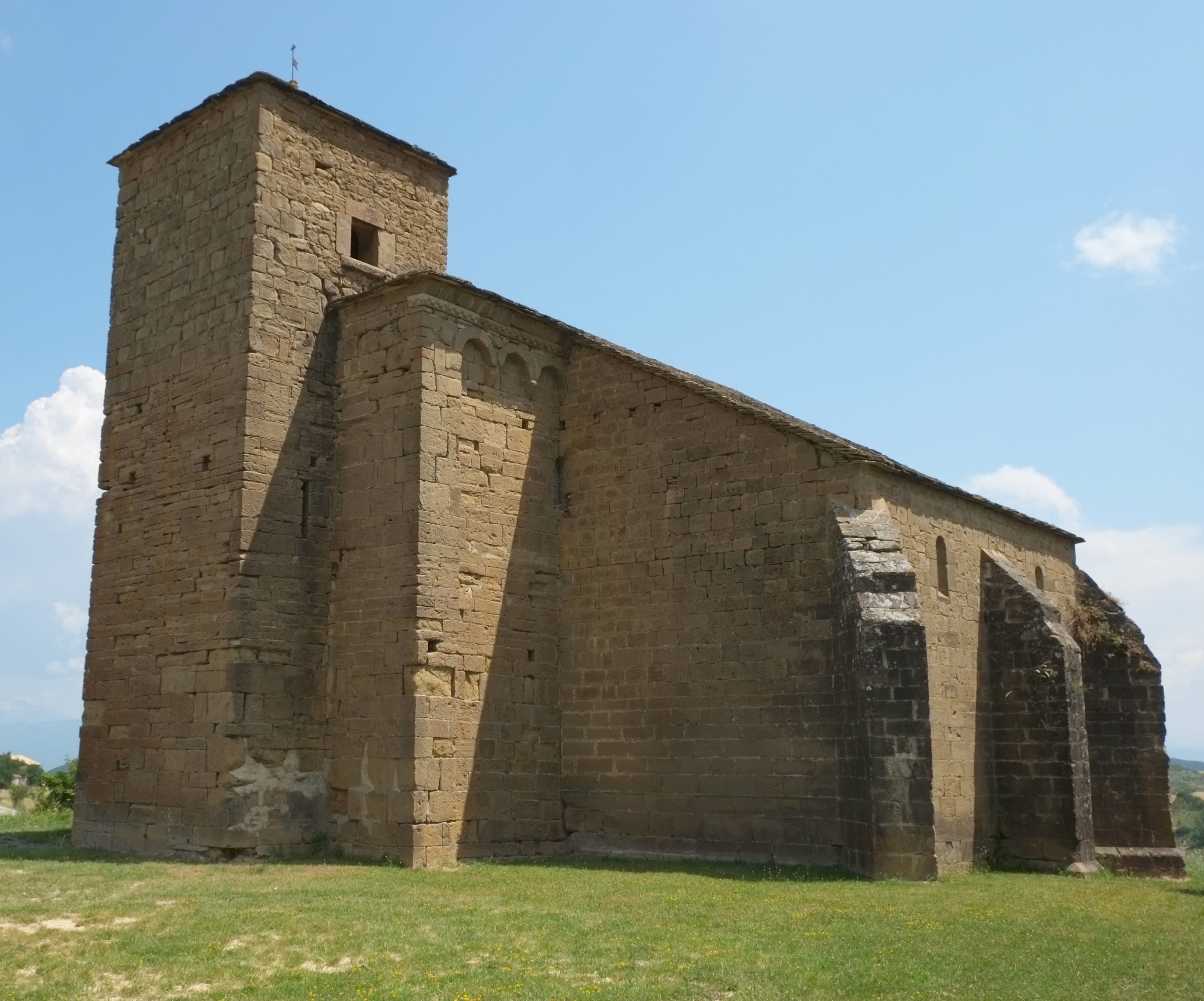 Kirche Santos Julián y Basilisa in Bagüés in der spanischen Provinz Saragossa (Aragonien/Spanien)